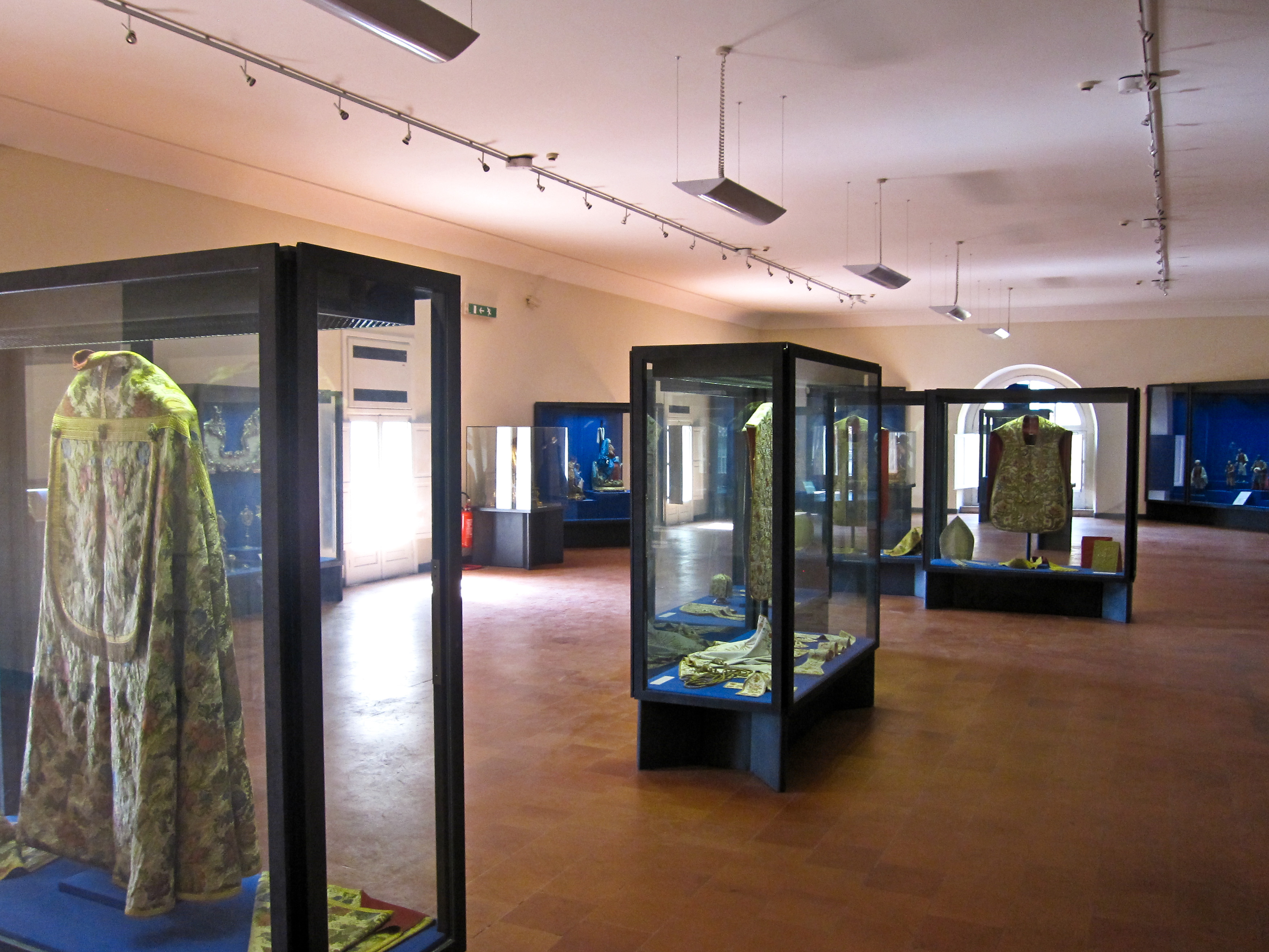 Il Museo di San Lorenzo Maggiore (Napoli).